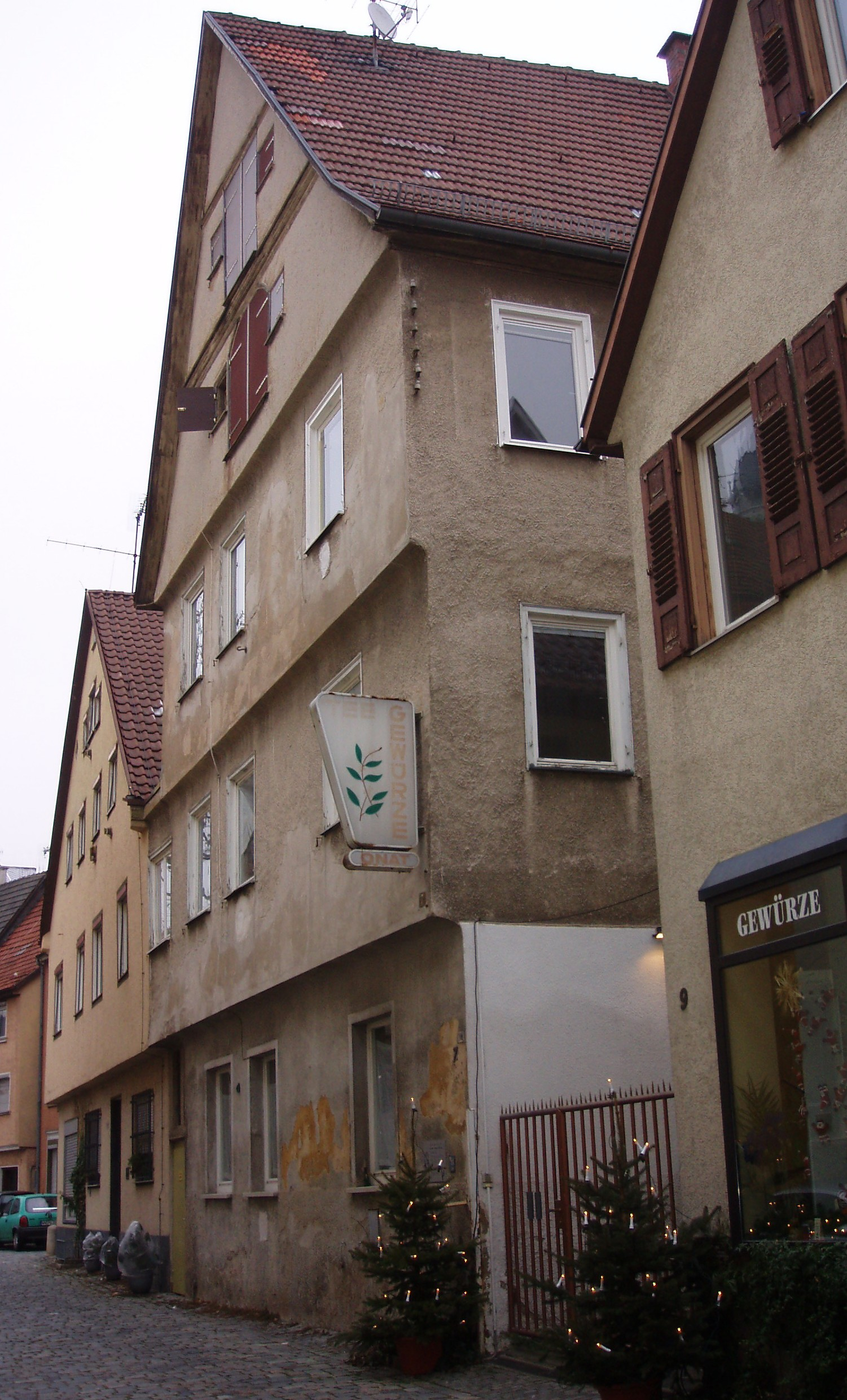 Kupfergasse 7, Esslingen